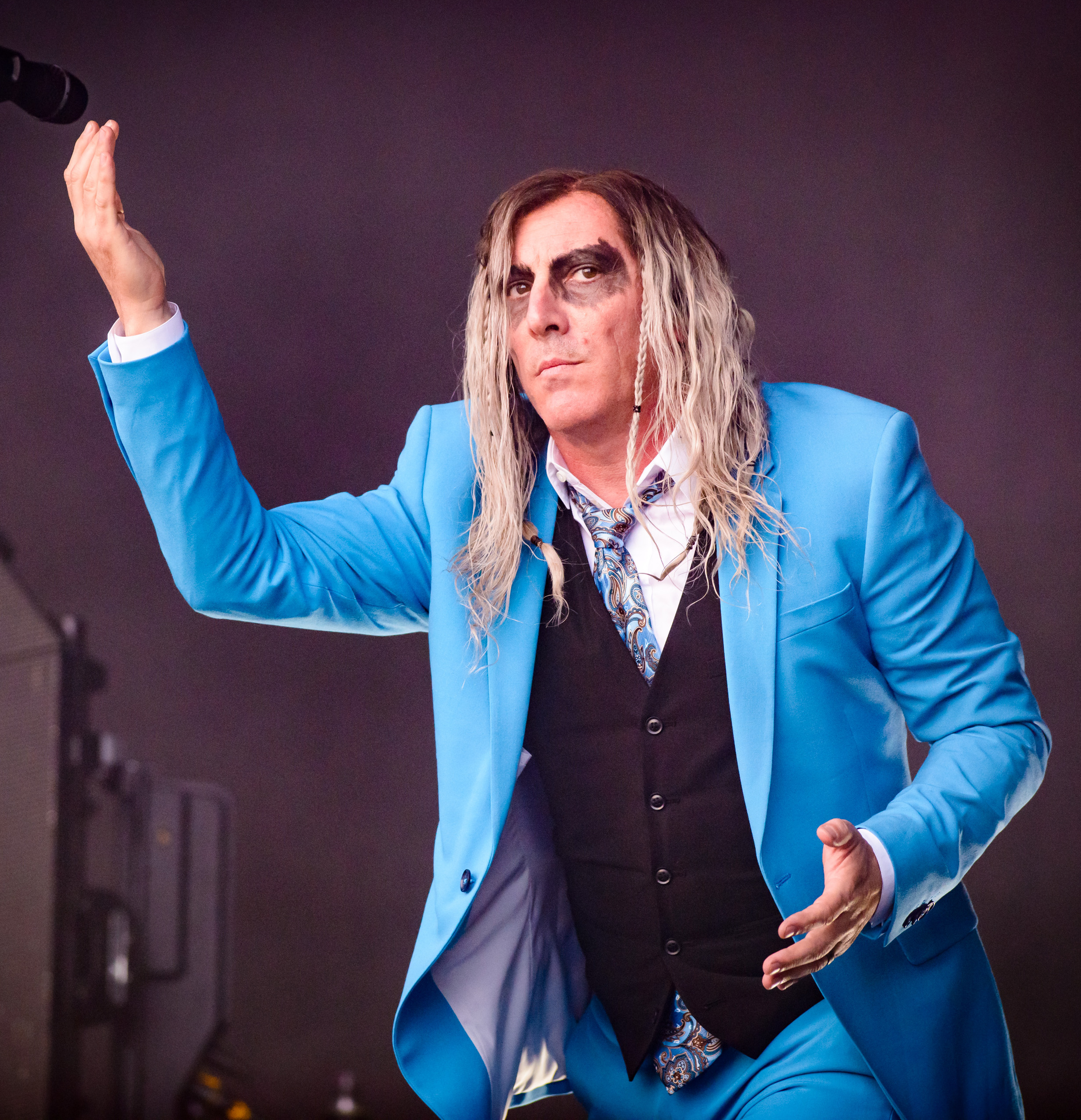 'Rock im Park 2018; Zeppelinfeld Nürnberg': 'A Perfect Circle'